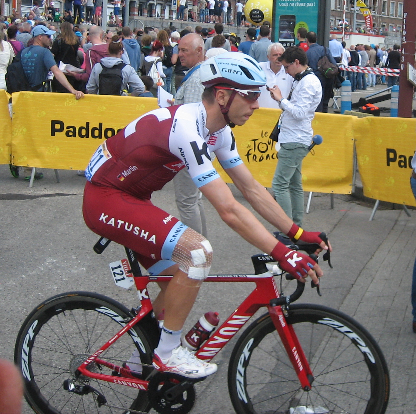 Start in Verviers (België) van de 3e etappe van Le Tour de France 2017.